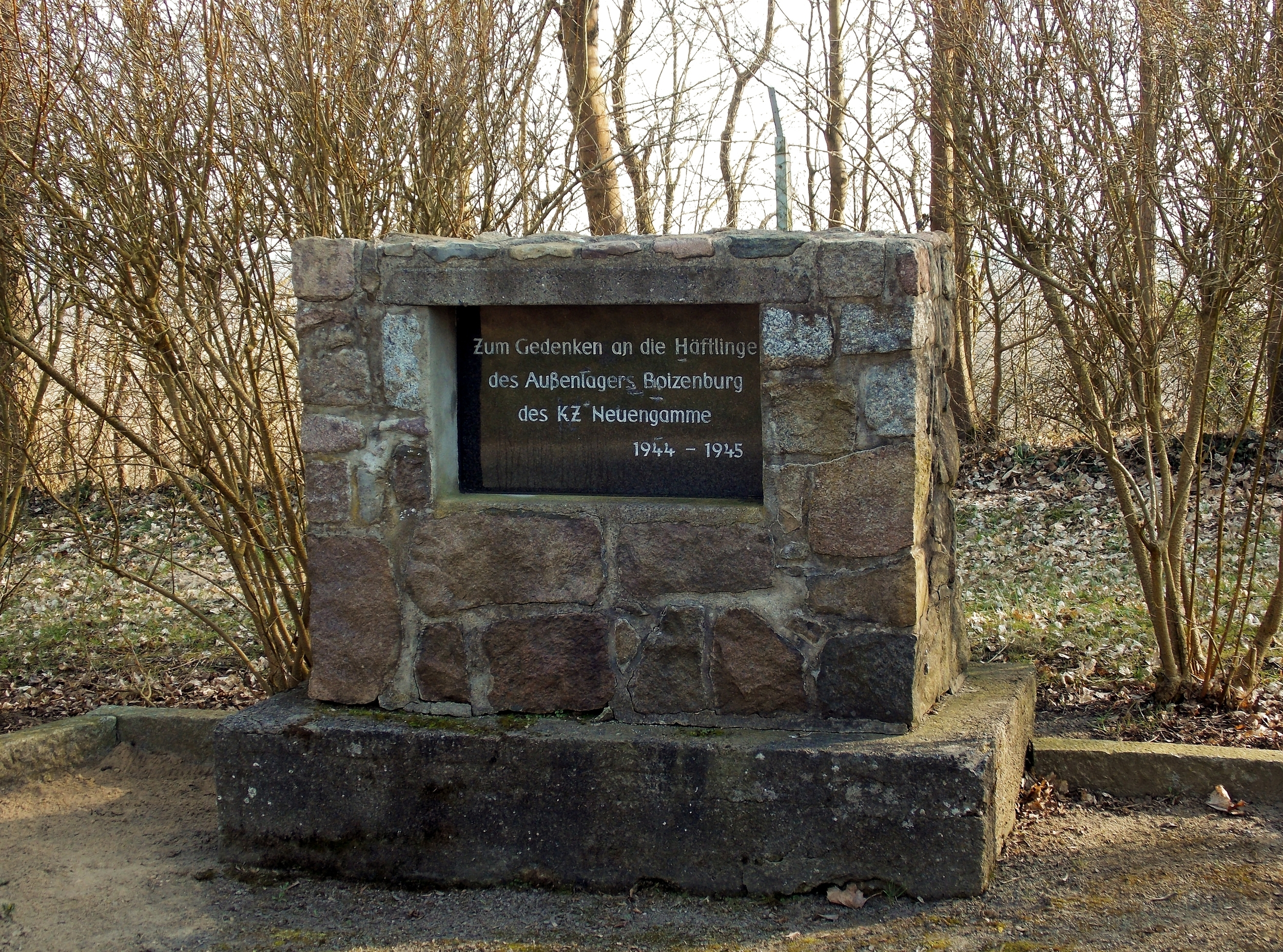 Denkmal KZ Außenlager Boizenburg, geschaffen von G.Zecher im Jahr 1969